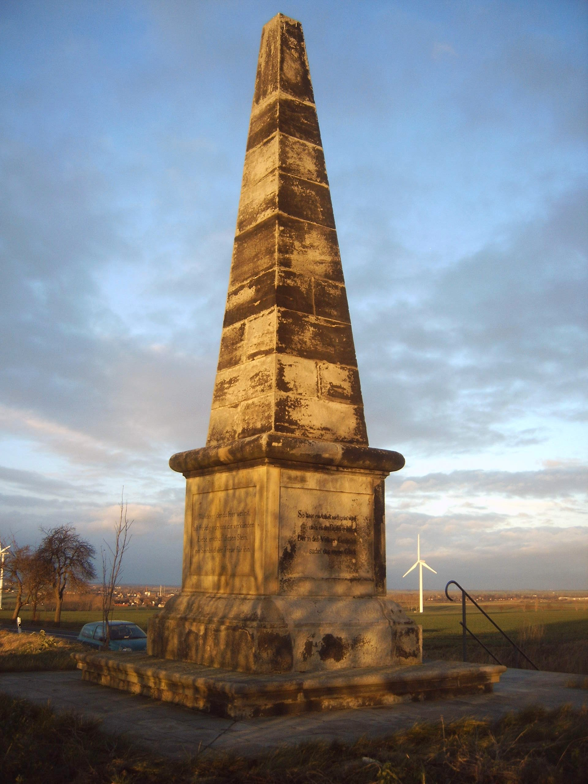 Obelisk bei Giersleben in Sachsen-Anhalt, L 72 zwischen Schackenthal und Warmsdorf